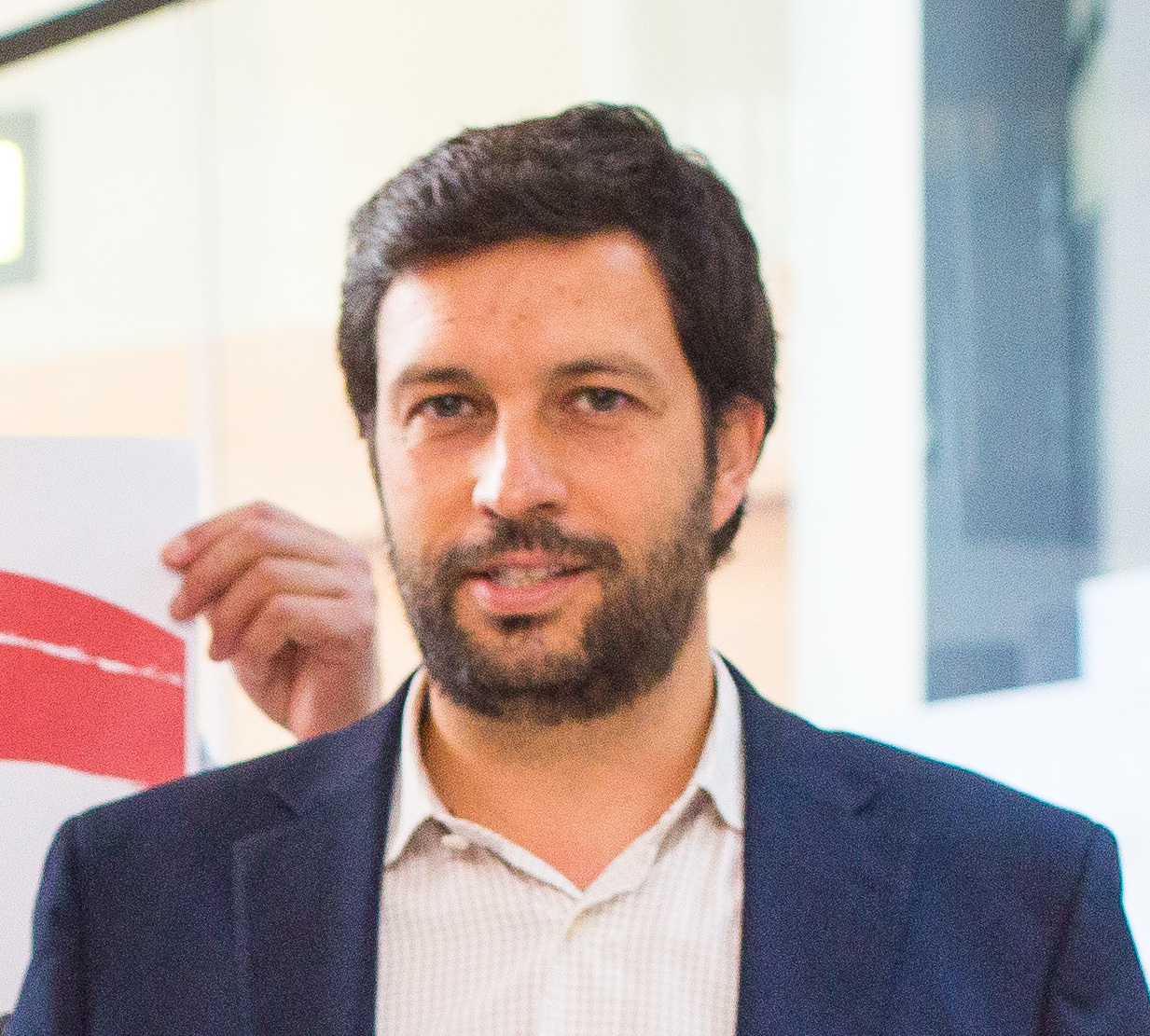 F70A2833